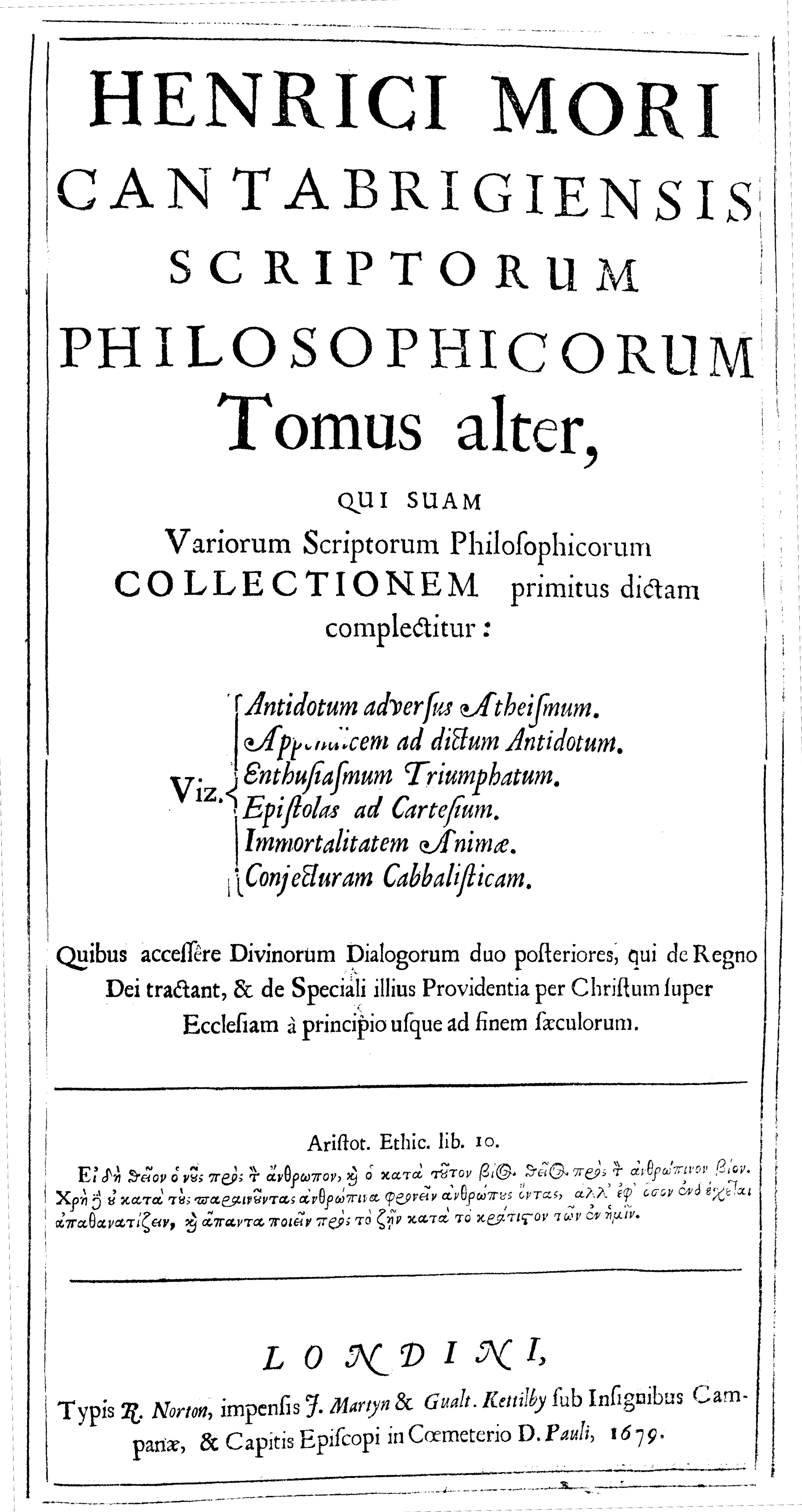 Henrici Mori Cantabrigiensis Scriptorum philosophicorum tomus alter, qui suam variorum scriptorum philosophicorum collectionem primitus dictam complectitur: viz. Antidotum adversus atheismum. Appendicem ad dictum antidotum. Enthusiasmum triumphatum. Epistolas ad Cartesium. Immortalitatem animae. Conjecturam cabbalisticam. Quibus accessere divinorum dialogorum duo posteriores, qui de regno Dei tractant, & de speciali illius providentia per Christum …. - Londini : typis R. Norton : impensis F. Martin & Gualt. Kettilby sub insignibus Campanae, & capitis episcopi in coemeterio d. Pauli, 1679. - [2], 758, [32] p. : ill. .